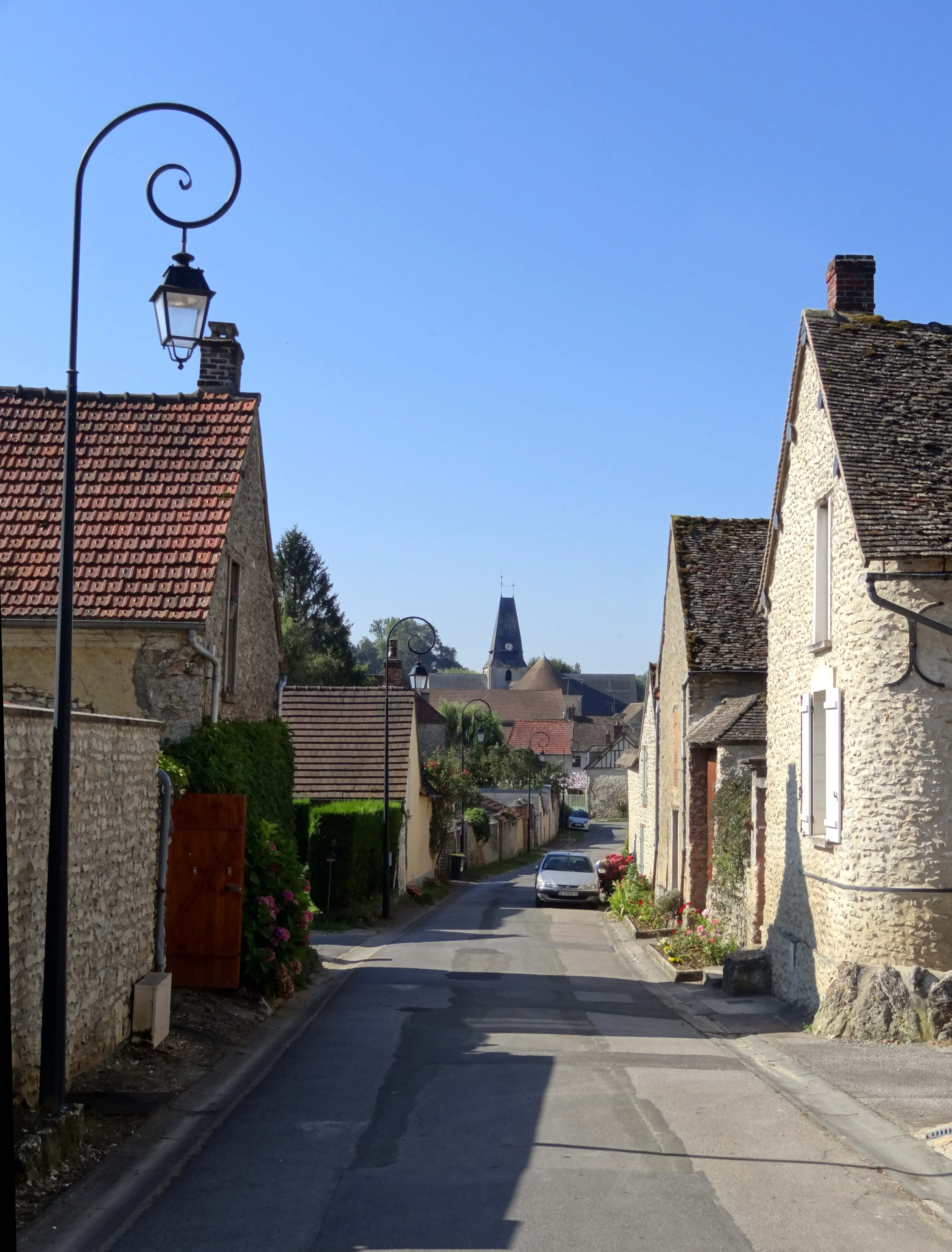 Boury-en-Vexin - voir titre.